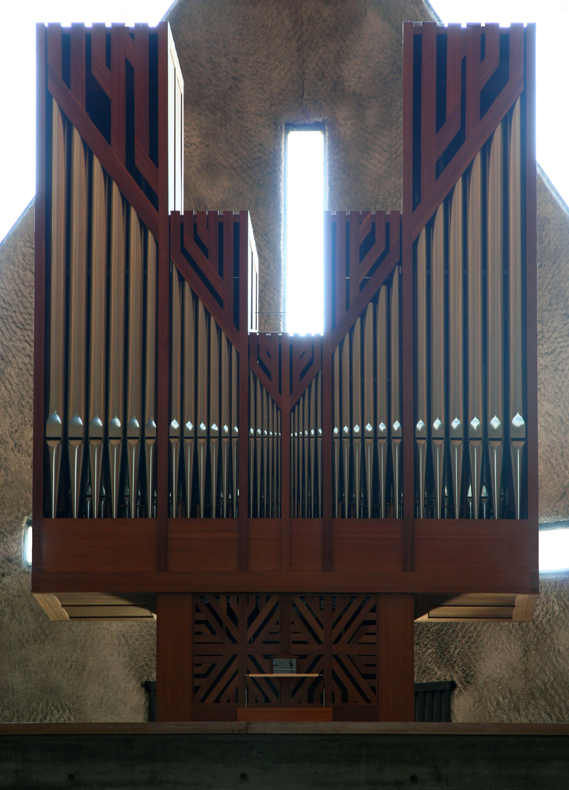 Römisch-katholische Pfarrkirche St. Paulus (Dielsdorf)